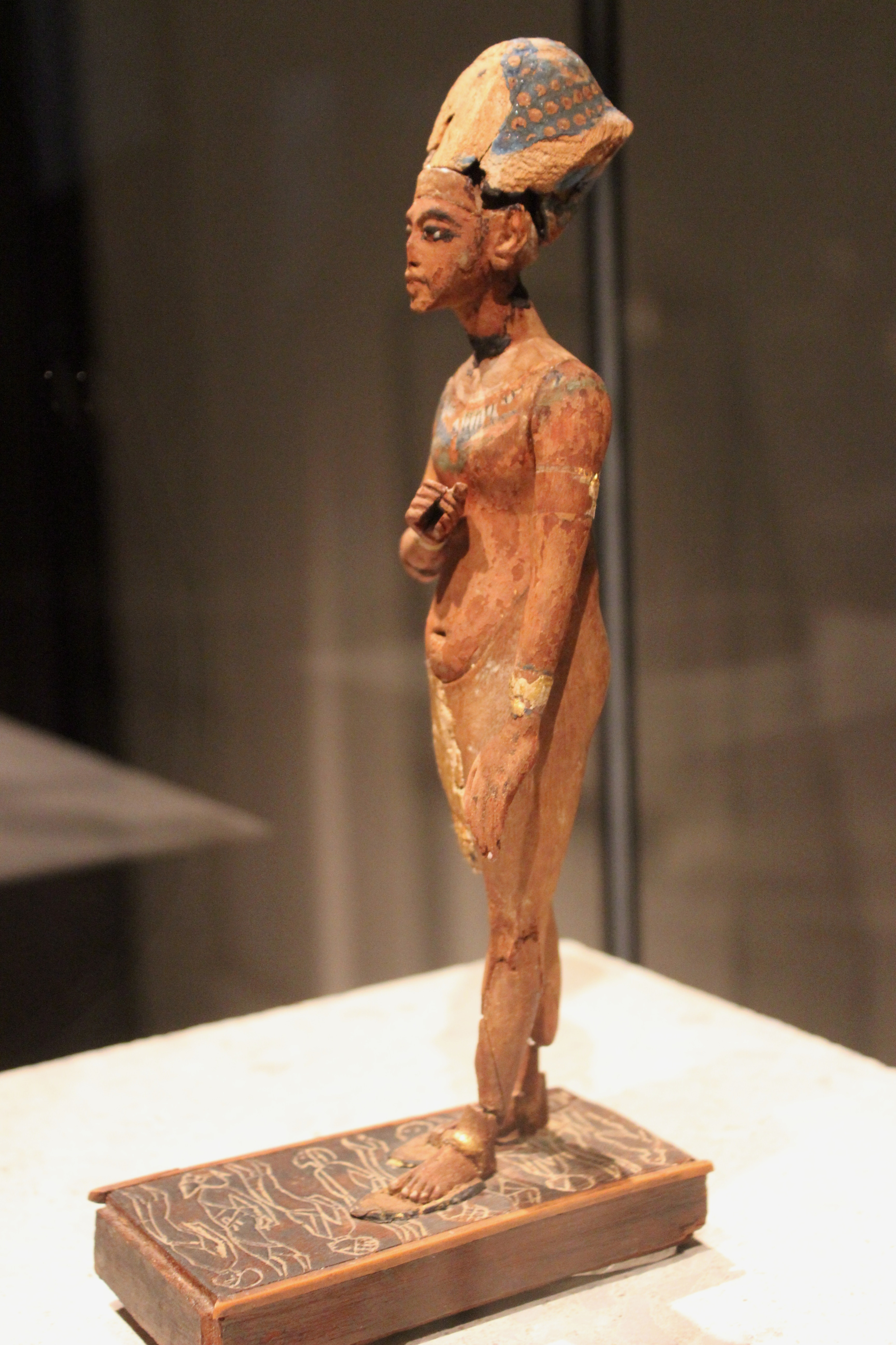 Estatua de Akenatón. Berlín, Neues Museum.